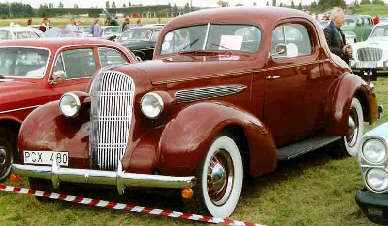 Oldsmobile Series L-353837 Sport Coupé 1935